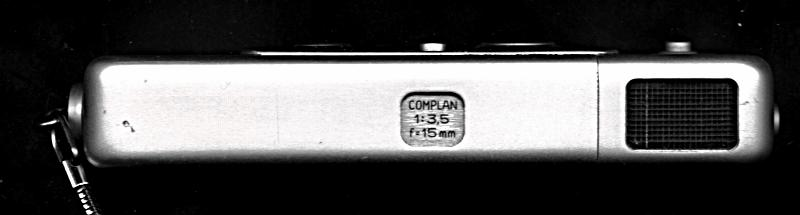 4 element 3 group COMPLAN lens on Minox B 8x11mm camera 天塞镜头